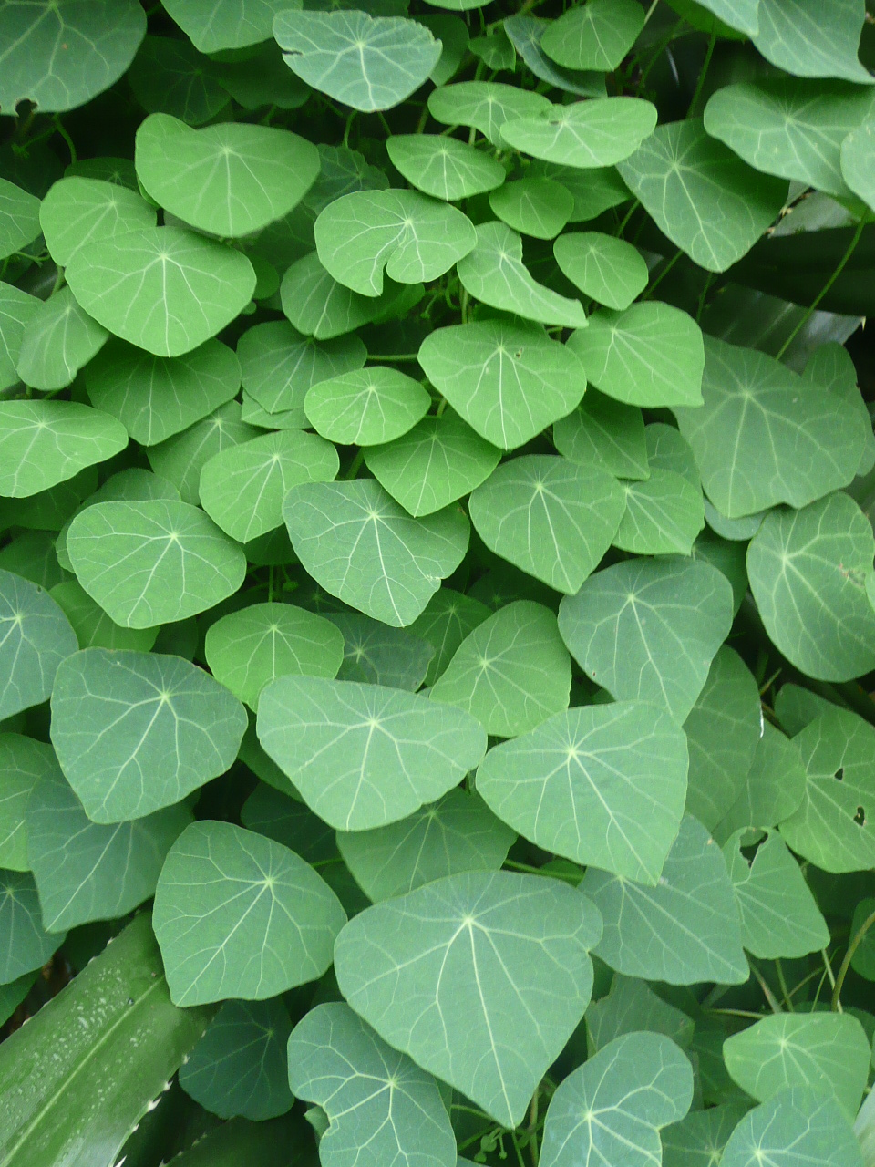 Stephania cephalantha à Taïwan